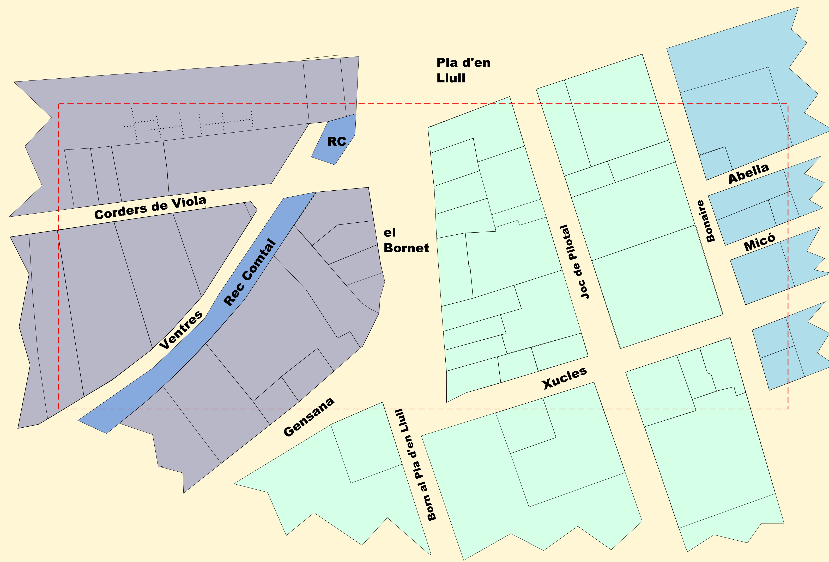 Karte der Ausgrabungsstätte Mercat del Born (1717) mit Details der Häuser. Die rote Linie kennzeichnet den sichtbaren Raum der Ausgrabungsstätte. Die grauen Flächen kennzeichnen das Industrie- und Handwerkerviertel. Die grünen Flächen kennzeichnen das Wohn- und Vergnügungsviertel und die blauen Flächen stehen für das Meer- und Fischerviertel.